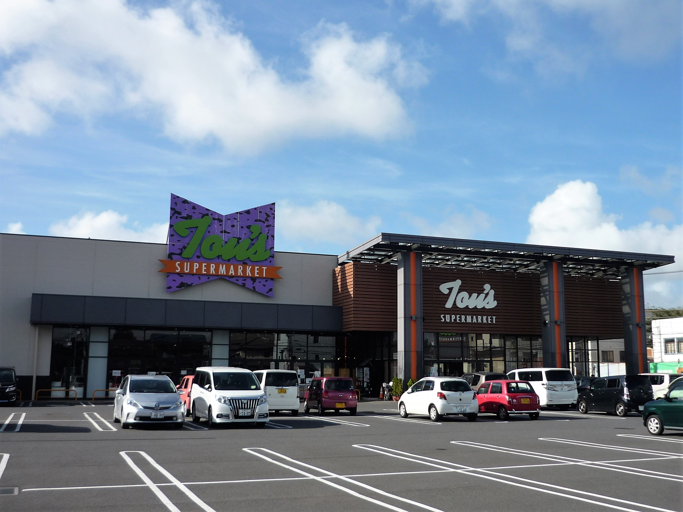 トウズ 八街店 Panasonic Lumix DMC-FS3